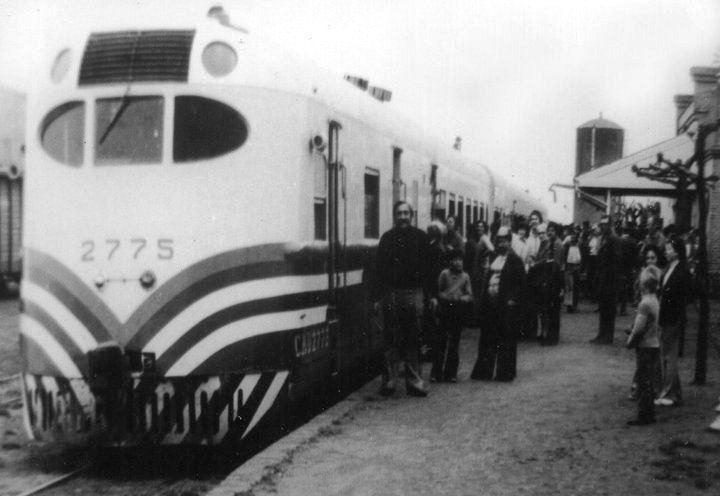 Estación Dudignac en el último servicio del Midland